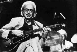 Jimmy Gourley et sa fidèle Gibson ES-150.